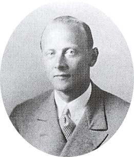 El príncipe Cristóbal de Hesse.